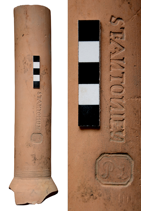 Gepresste Wasserleitungsröhre mit der typischen Stempelmarke von St. Antönien, und der Nebenmarke von Peter Lötscher dem Jüngeren